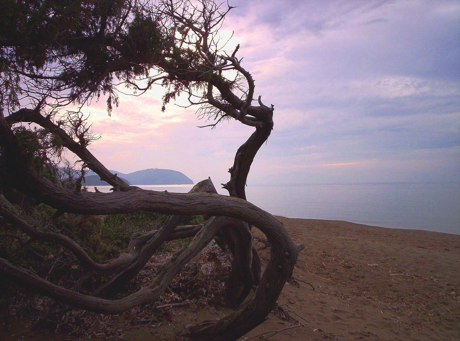 Rimigliano veduta